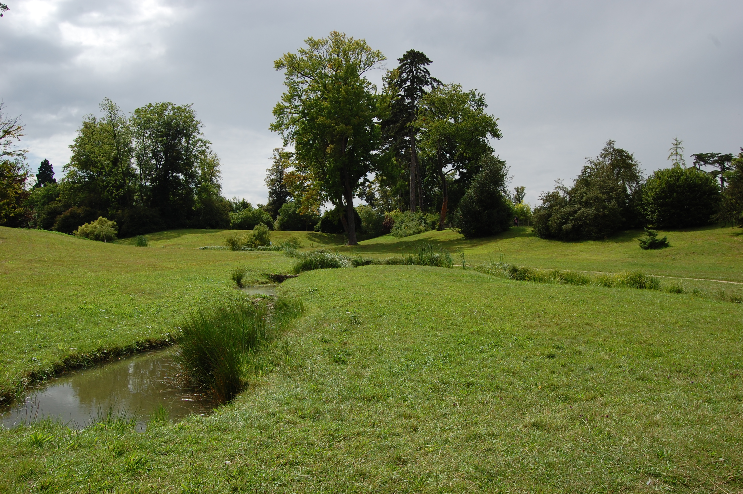 Les cascatelles vues depuis l'étang du Hameau de la Reine